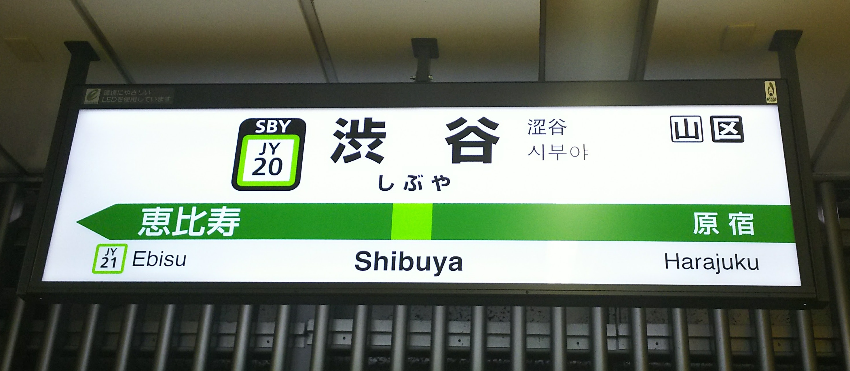 渋谷駅 山手線内回りの駅名標（駅ナンバリング対応型）